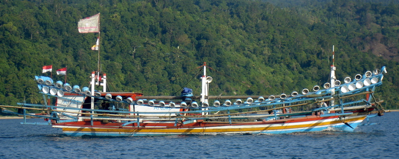 Fishing boat in Sumatra, Indonesia